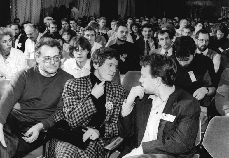 ADN-ZB-Kluge-17.12.89-fd-Leipzig: Parteitag Demokratischer Aufbruch. Der Gründungsparteitag des Demokratischen Aufbruch setzte seine Arbeit fort. Am Eröffnungstag hatte die Präsidentin des BRD-Bundestages, Prof. Dr. Rita Süssmuth, Grüße an die über 250 Delegierten aus allen Teilen der DDR überbracht.